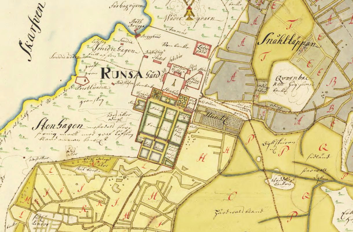 Runsa Slott, ägomätning (del av karta)